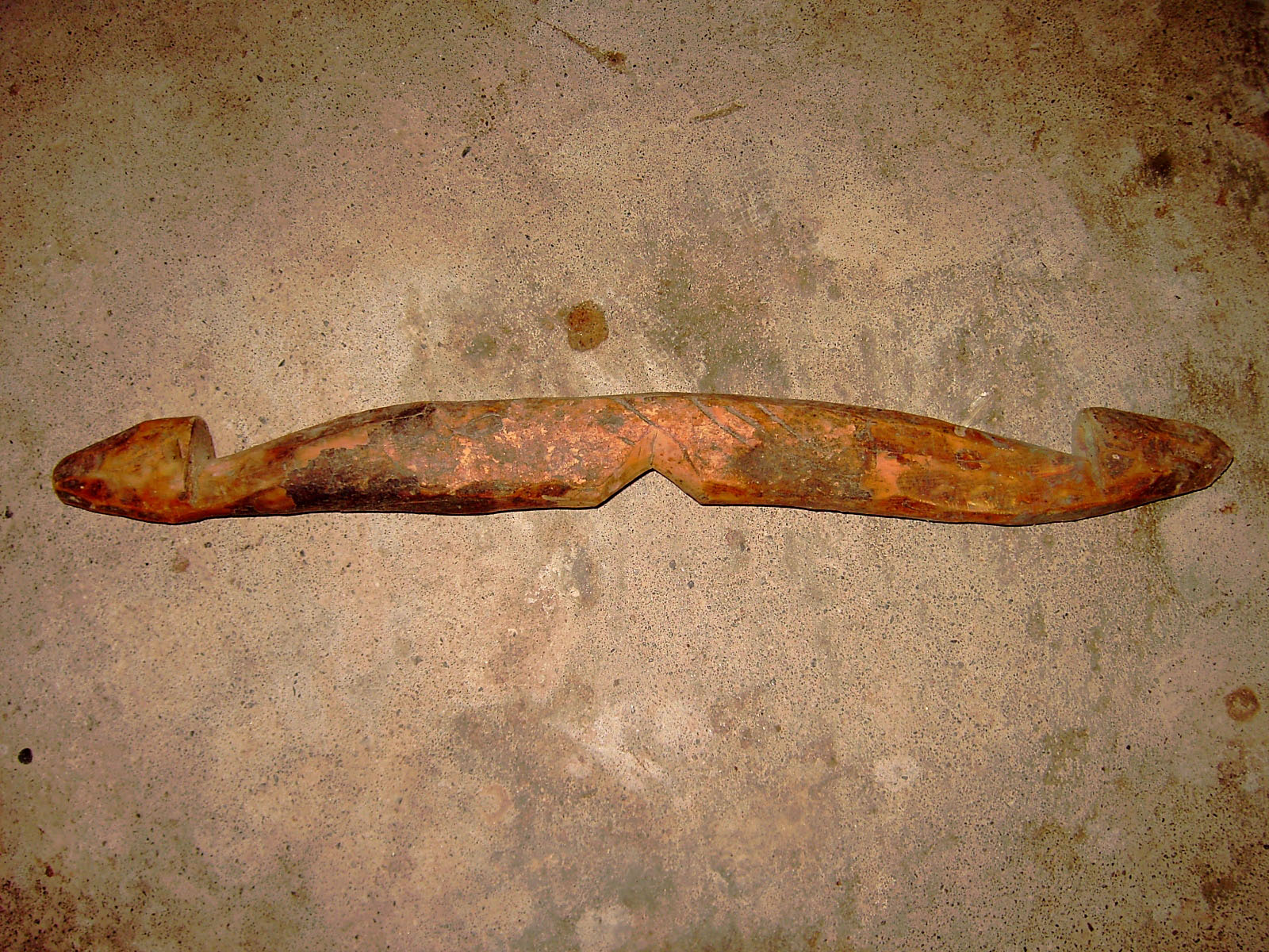 Aragonés: Canal ta despiezar os animals.